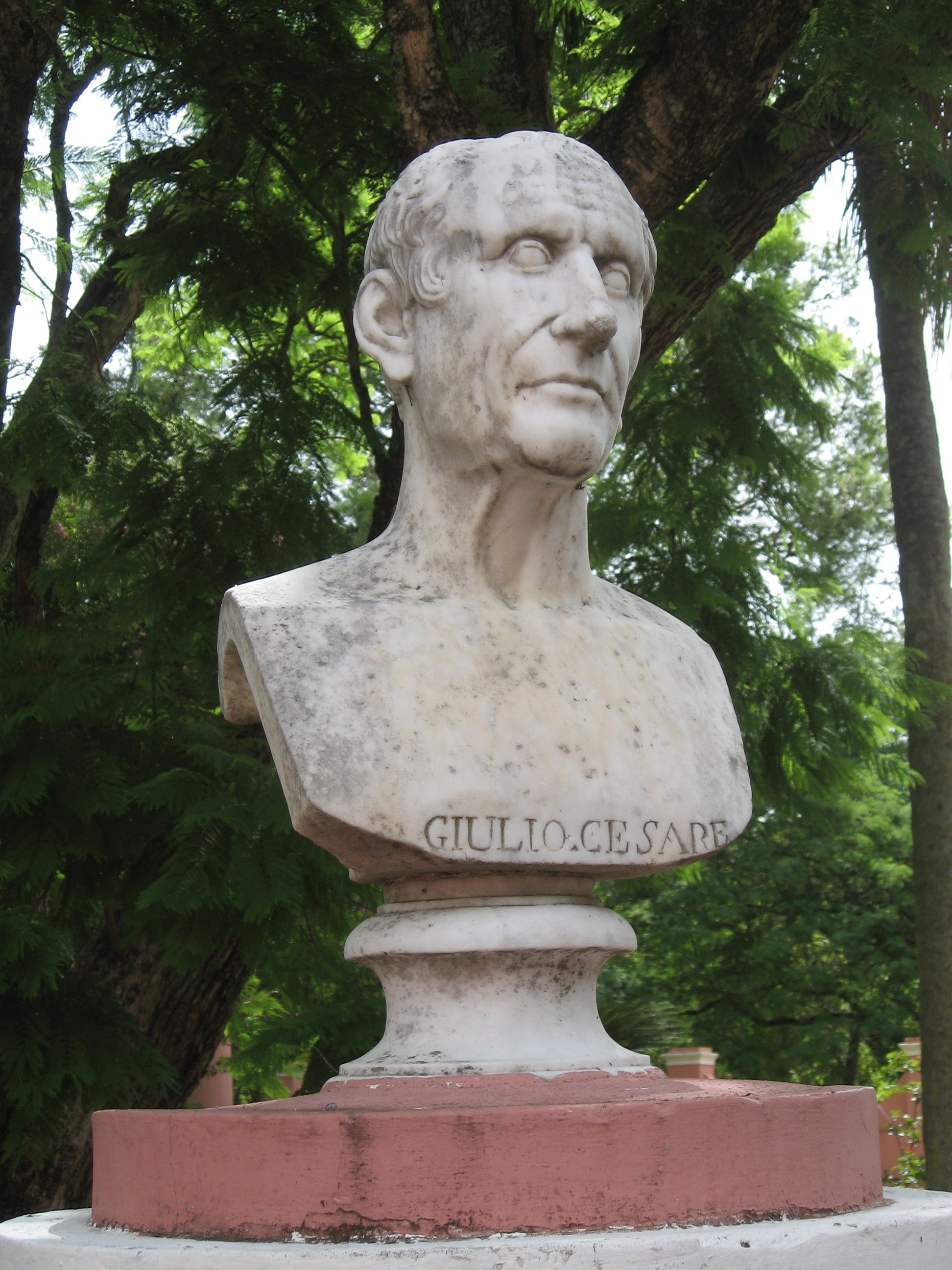 Foto del busto de Julio César, tomada en Palacio San José, Entre Ríos.